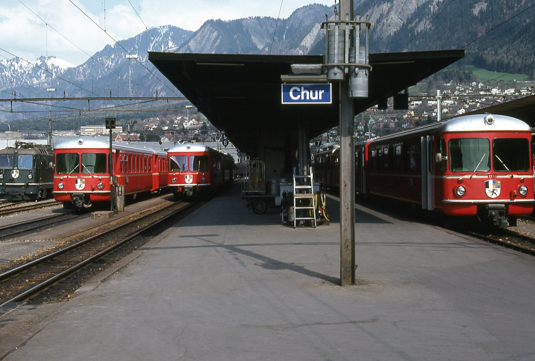 Photos: Trams aux Fils. Prise en mars 1979 Gare de Chur La ligne des Rhétiques à été construite entre 1890 et 1914 à voie métrique, sa longueur et de 400 Kilomètres toutes lignes confondues. Le réseau compte 506 viaducs et 119 tunnels dont celui de la Veirena de 19 Km